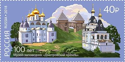 100 лет музею-заповеднику «Дмитровский кремль».